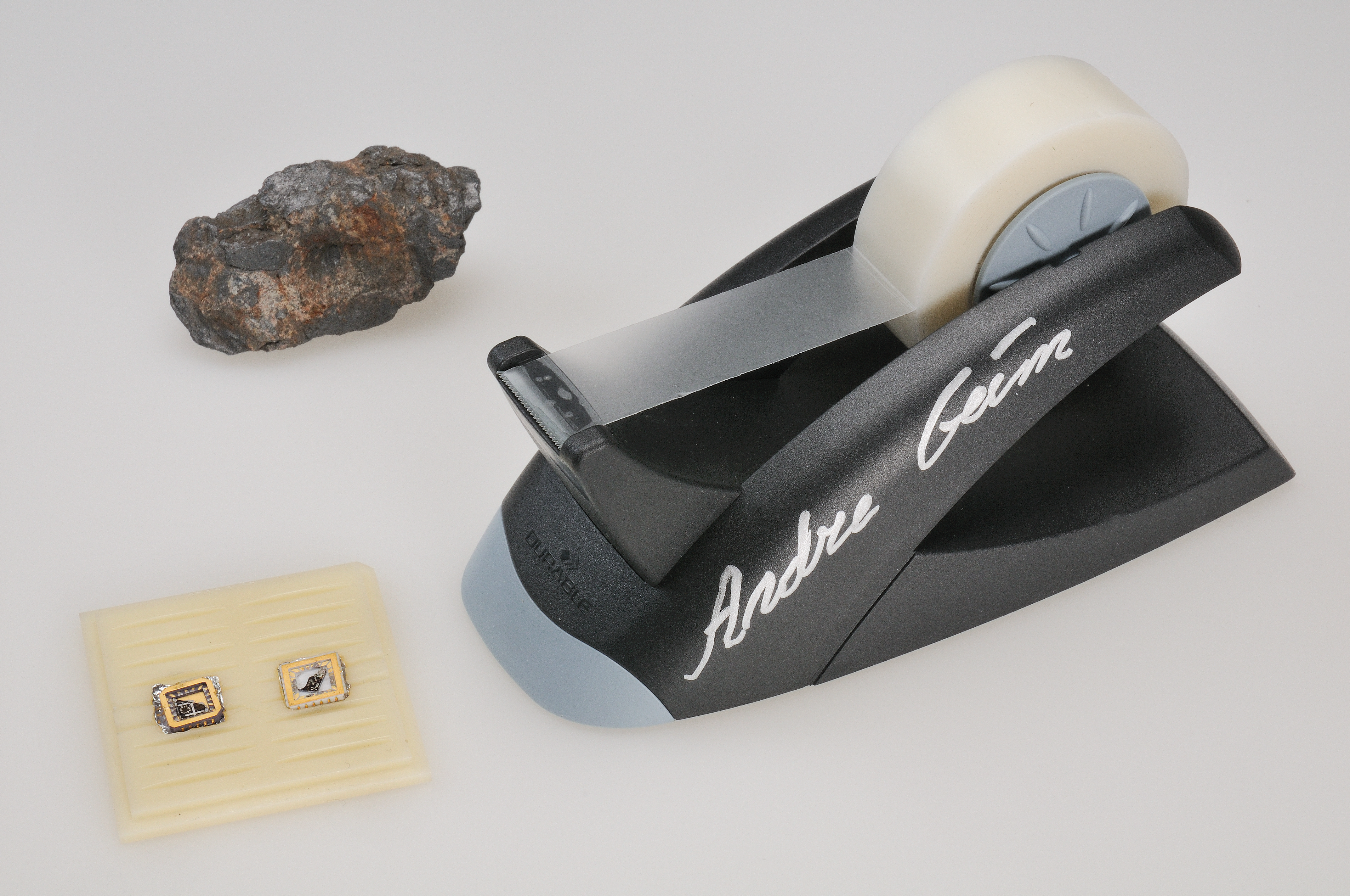 Andre Geim & Konstantin Novoselov Grafit, tejprulle och grafentransistor Det som händer när man skriver med en blyertspenna är att flagor av materialet grafit fastnar på papperet. En extremt tunn sådan flaga skulle vara ett nät av kolatomer som är endast ett atomskikt tjockt. Länge var detta ett rent teoretiskt material som ansågs omöjligt att framställa i verkligheten. Andre Geim och Konstantin Novoselov prövade dock att med vanlig tejp fånga upp tunna flagor från en bit grafit och det visade sig att vissa av flagorna bara var ett atomlager tjocka. Det nya materialet grafen var verklighet och dess egenskaper kunde kartläggas. Grafen är det tunnaste och samtidigt starkaste materialet som någonsin framställts. Det leder elektricitet bättre än de flesta material. Inom tekniken öppnar grafen möjligheter inom såväl materialteknik som nya elektronik. Det första provet på grafen i en elektronisk komponent visas till höger. Föremålen donerades till Nobelmuseet av Andre Geim och Konstantin Novoselov 2010.